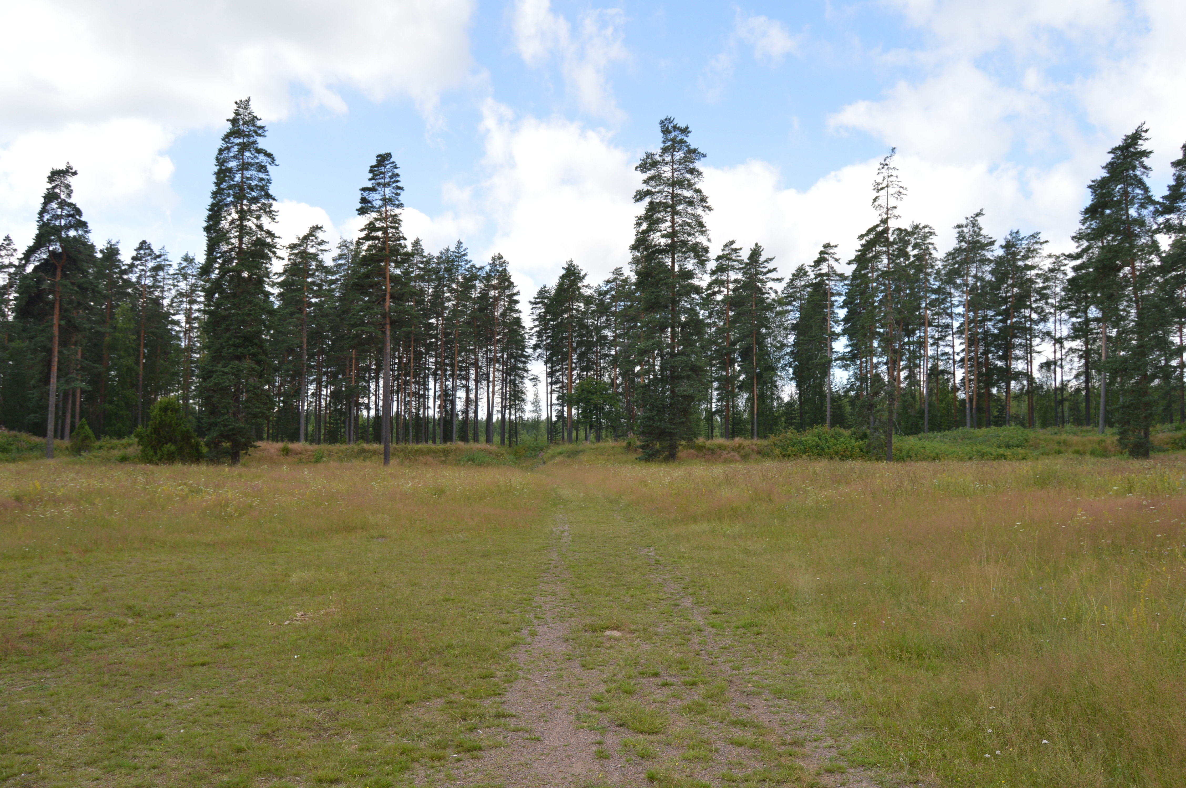 Utin linnoitus